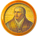 Medallón de la frise des papes de la basílica de San Pablo Extramuros, Roma. Es un retrato sobre mosaico que representa a Adriano V, es el 186º papa de la Iglesia católica (1276-1276). Enlaza con la serie de medallones que reproducen la figura de todos los Papas de la historia.